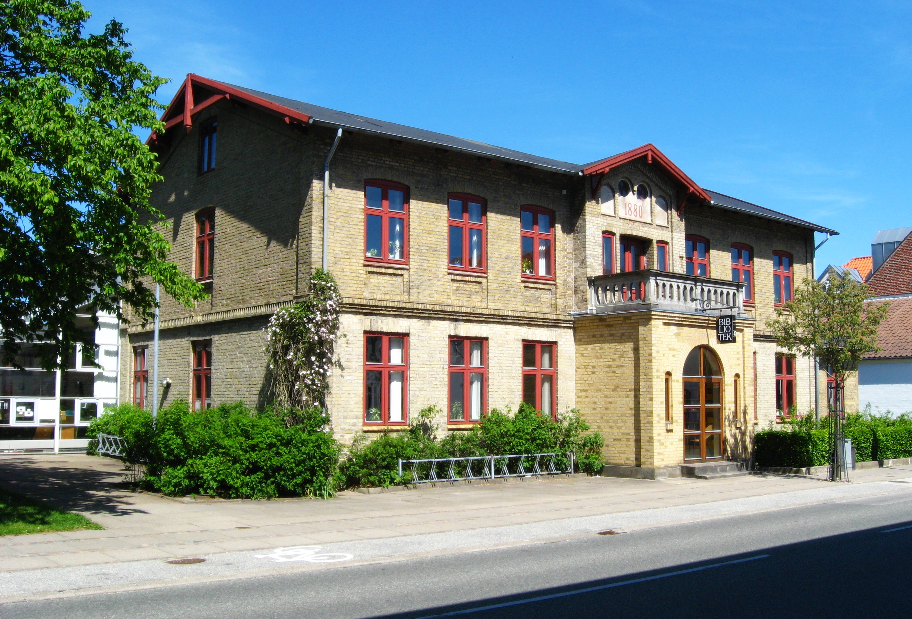 Dronninglund bibliotek